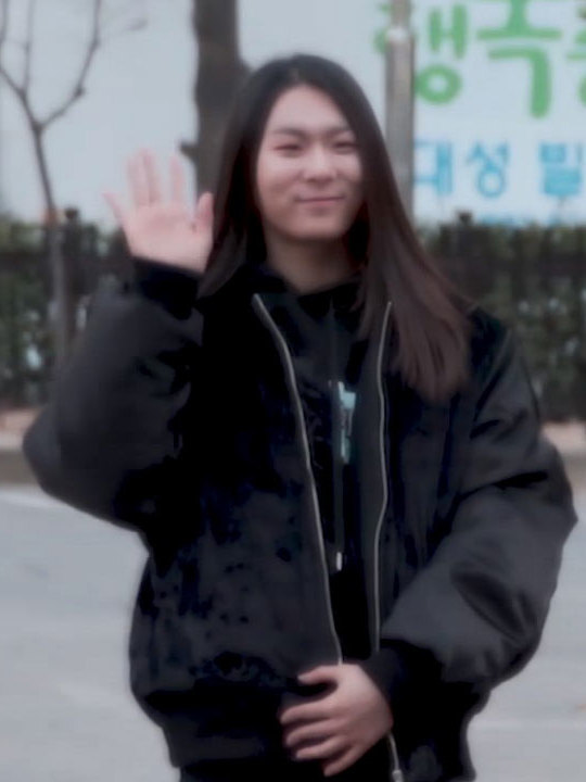 171208 KBS 뮤직뱅크 출근길